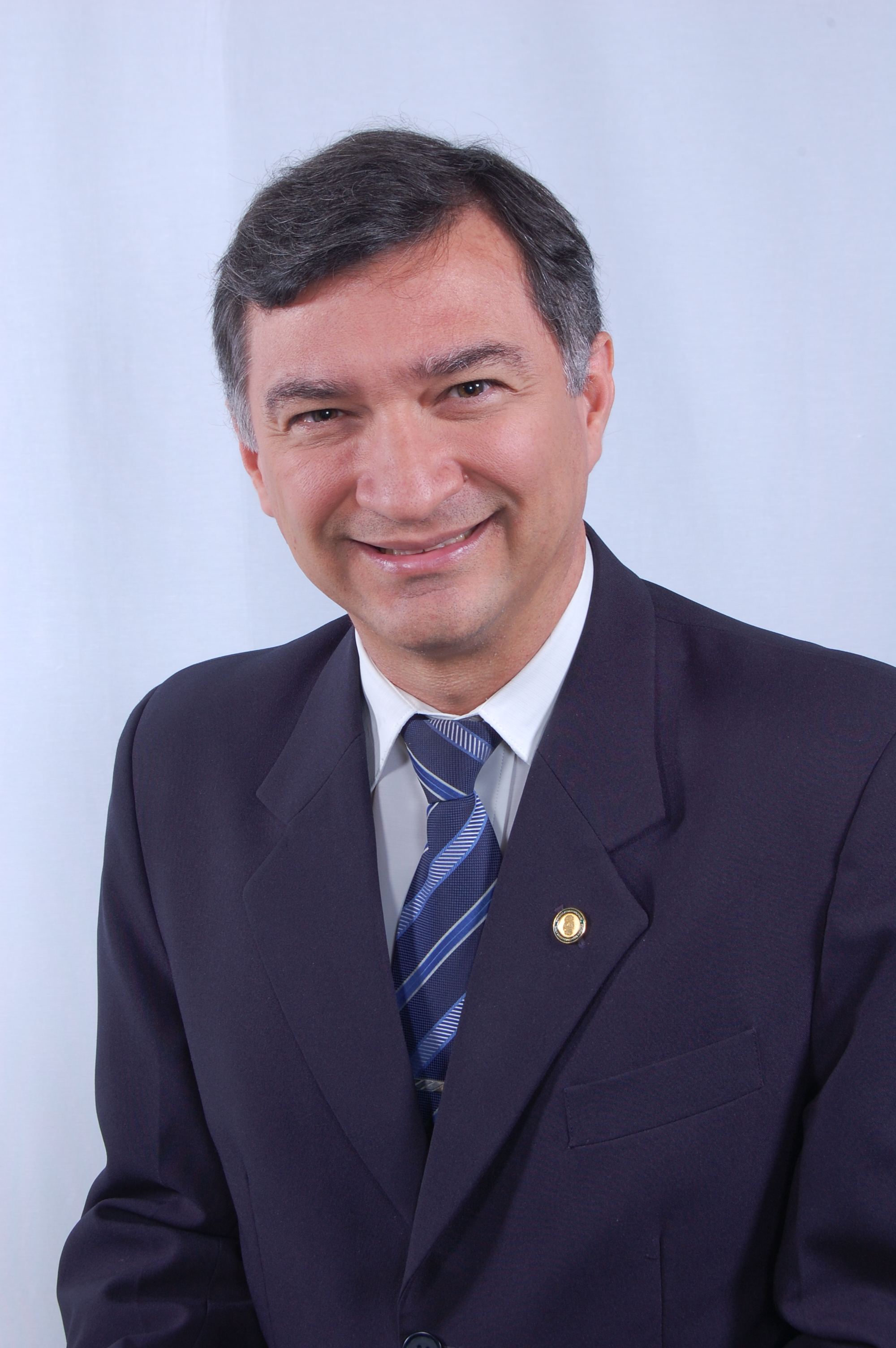 O escritor e palestrante brasileiro Emídio Silva Falcão Brasileiro